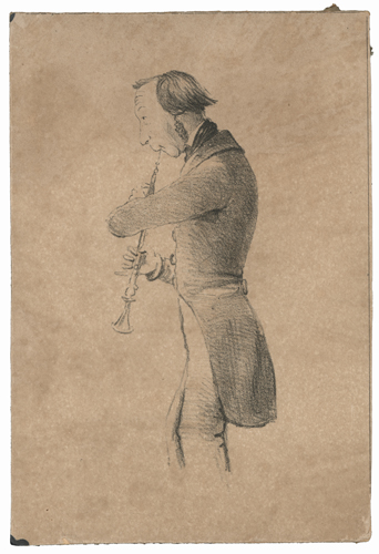 C. Reimers: Das Leipziger Gewandhausorchester im Lichte der Satire, 19 Karikaturen, lithographiert von Blau & Co., Leipzig um 1850 Johann Friedrich Diethe (1810-1891), Oboist